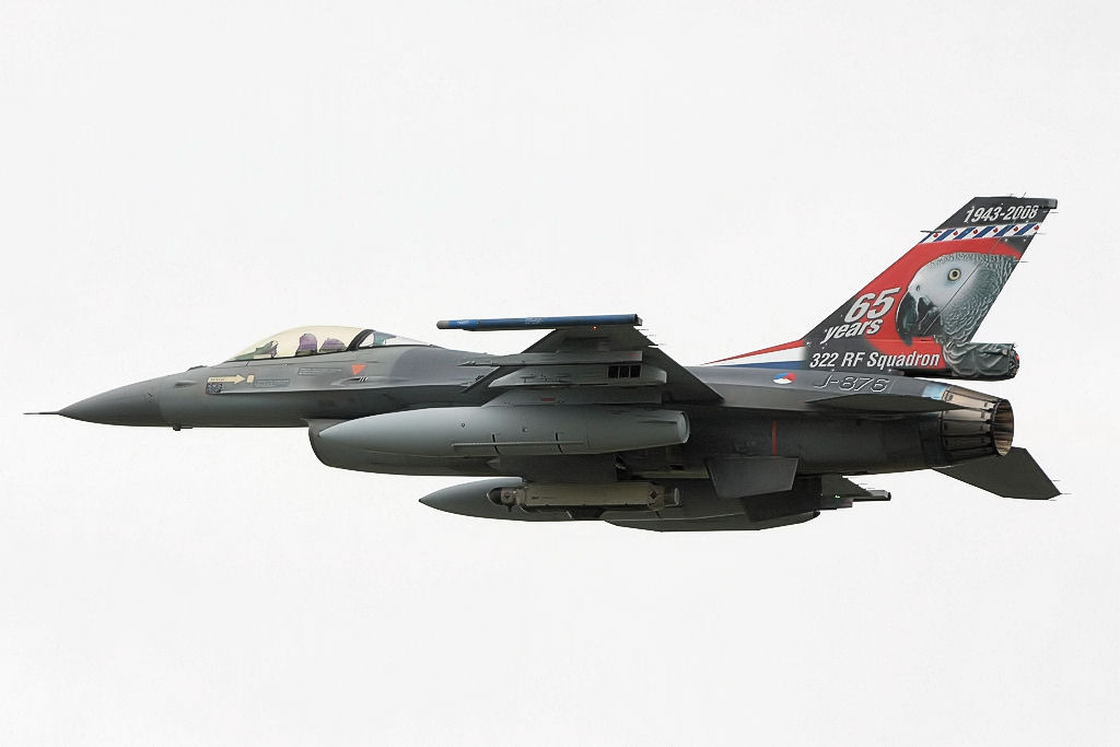 F16 - RIAT 2008